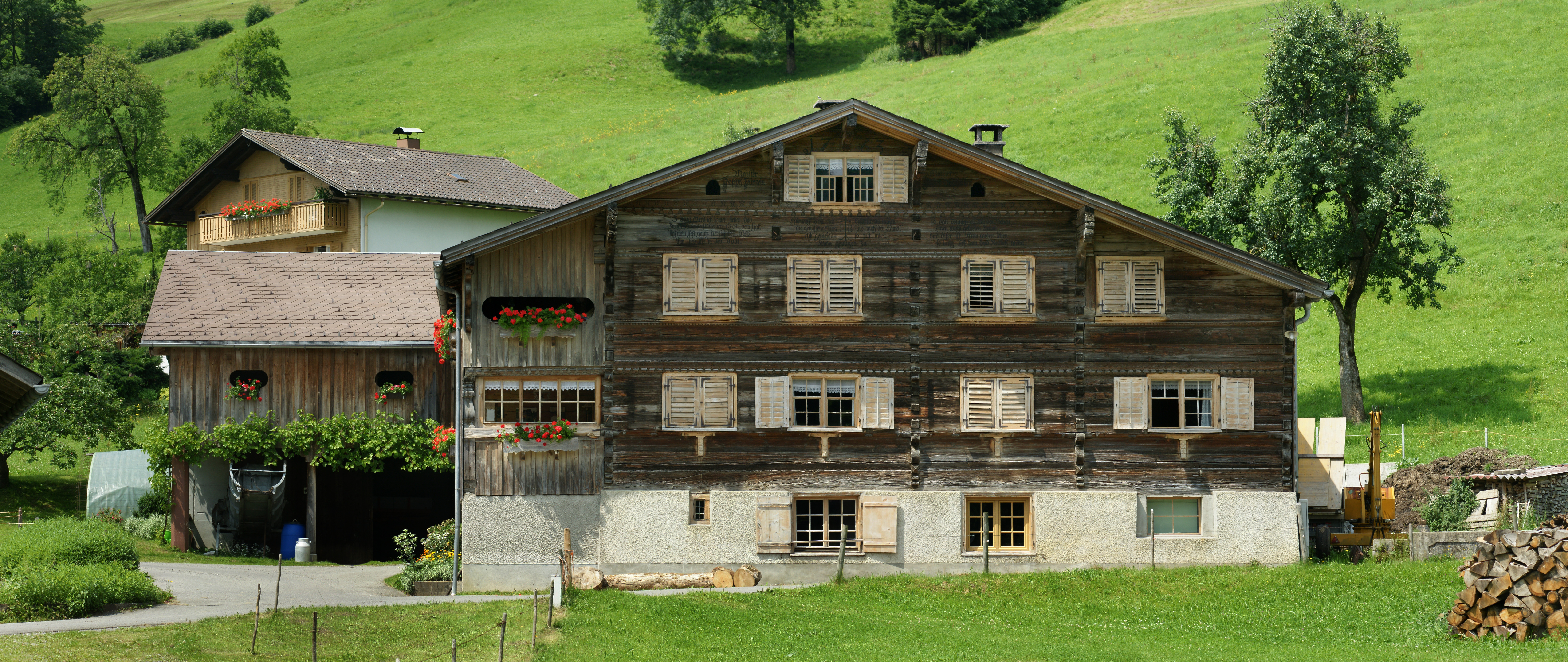 aus dem DEHIO Vorarlberg 1983: Einhof, Wohnteil bezeichnet Maister Joseph Feurstein 1763, 2geschossiger gestrickter Blockbau auf hohem Kellersockel mit flachgeneigtem Satteldach und Schopf, Giebelseite über den Sohlbalken und Sturtzbalken leicht vorkragend, Gesimse mit Zierfriesen, unter den Erdgeschoßfenstern Zierkonsolen mit figuralen Motiven; Pfettenköpfe profiliert mit Fratzen. Im Loch Nr.266 in Schwarzenberg, Vorarlberg. 8-Bild-Panorama NOTE: This image is a panorama consisting of multiple frames that were merged or stitched in software. As a result, this image necessarily underwent some form of digital manipulation. These manipulations may include blending, blurring, cloning, and colour and perspective adjustments. As a result of these adjustments, the image content may be slightly different from reality at the points where multiple images were combined. This manipulation is often required due to lens, perspective, and parallax distortions.